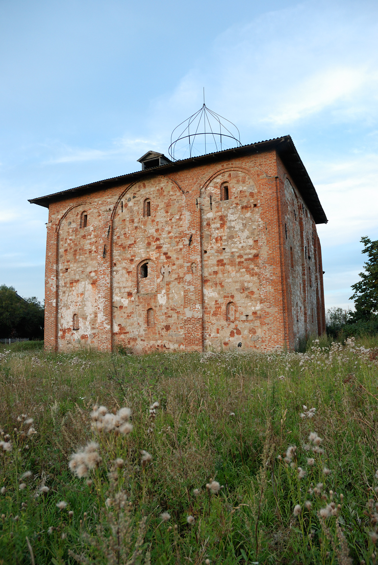 Великий Новгород, церковь Уверения Фомы в Воскресении Христовом на Мячине.